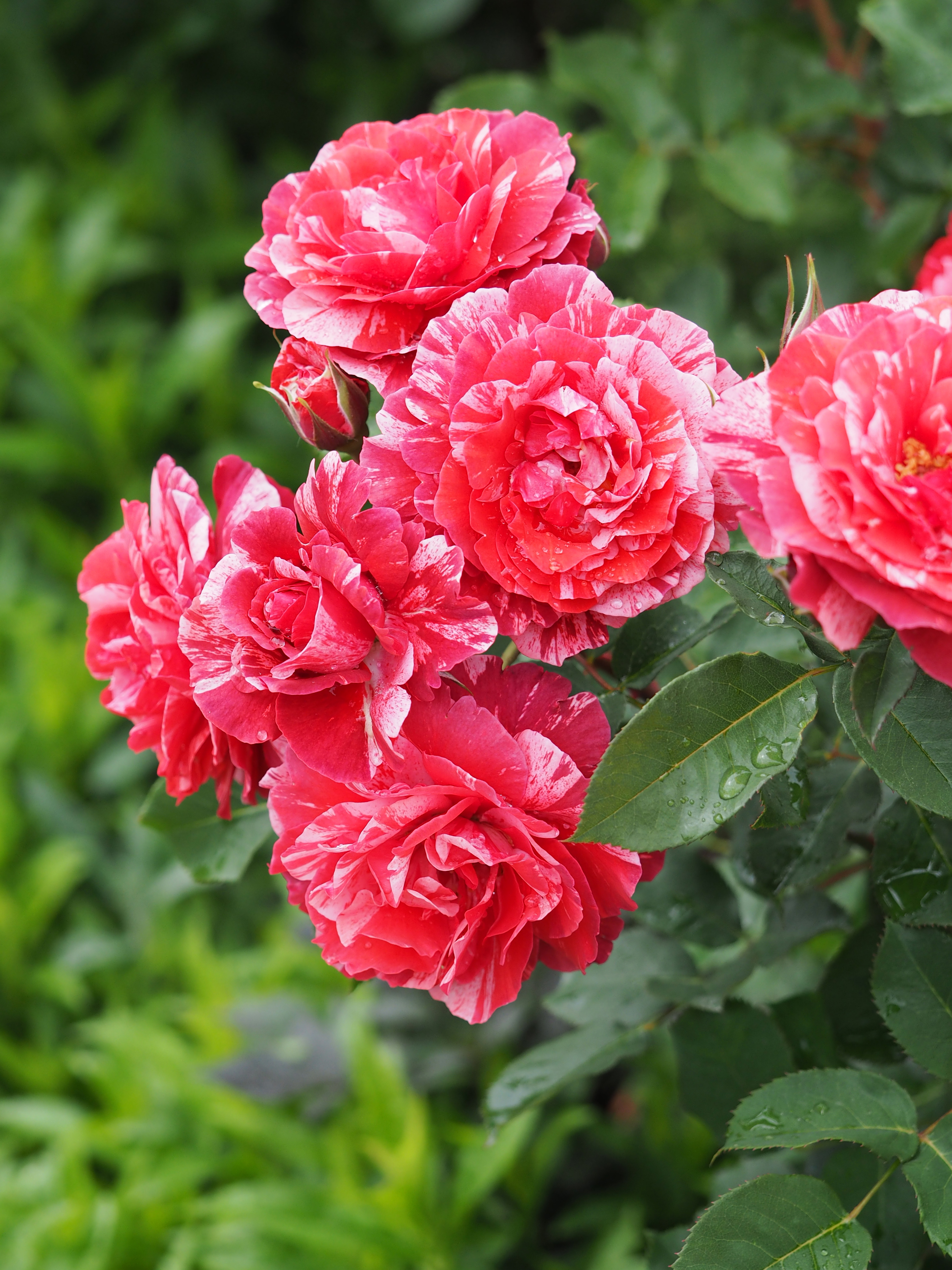 Rose, Paul Gauguin , バラ, ポール ゴーギャン, Hybrid Tea rose ハイブリッドティーローズ France フランス Delbard 2006